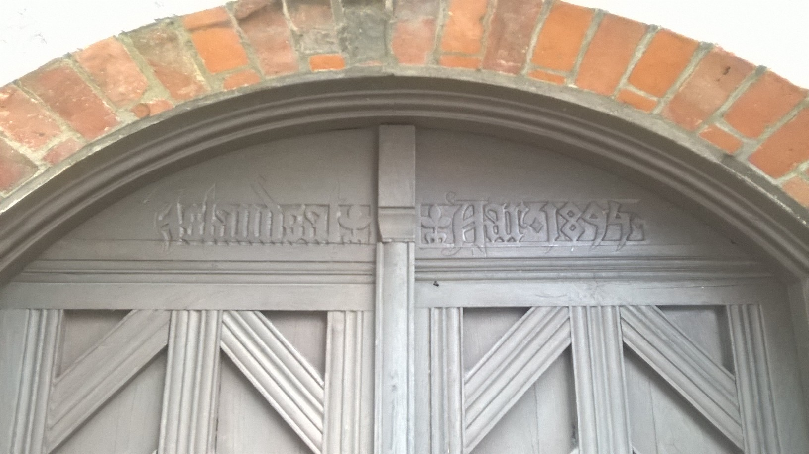 Nærbillede af årstallet over døren.